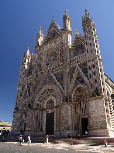 Orvieto Le Dôme-Façade-Ombrie-Italy